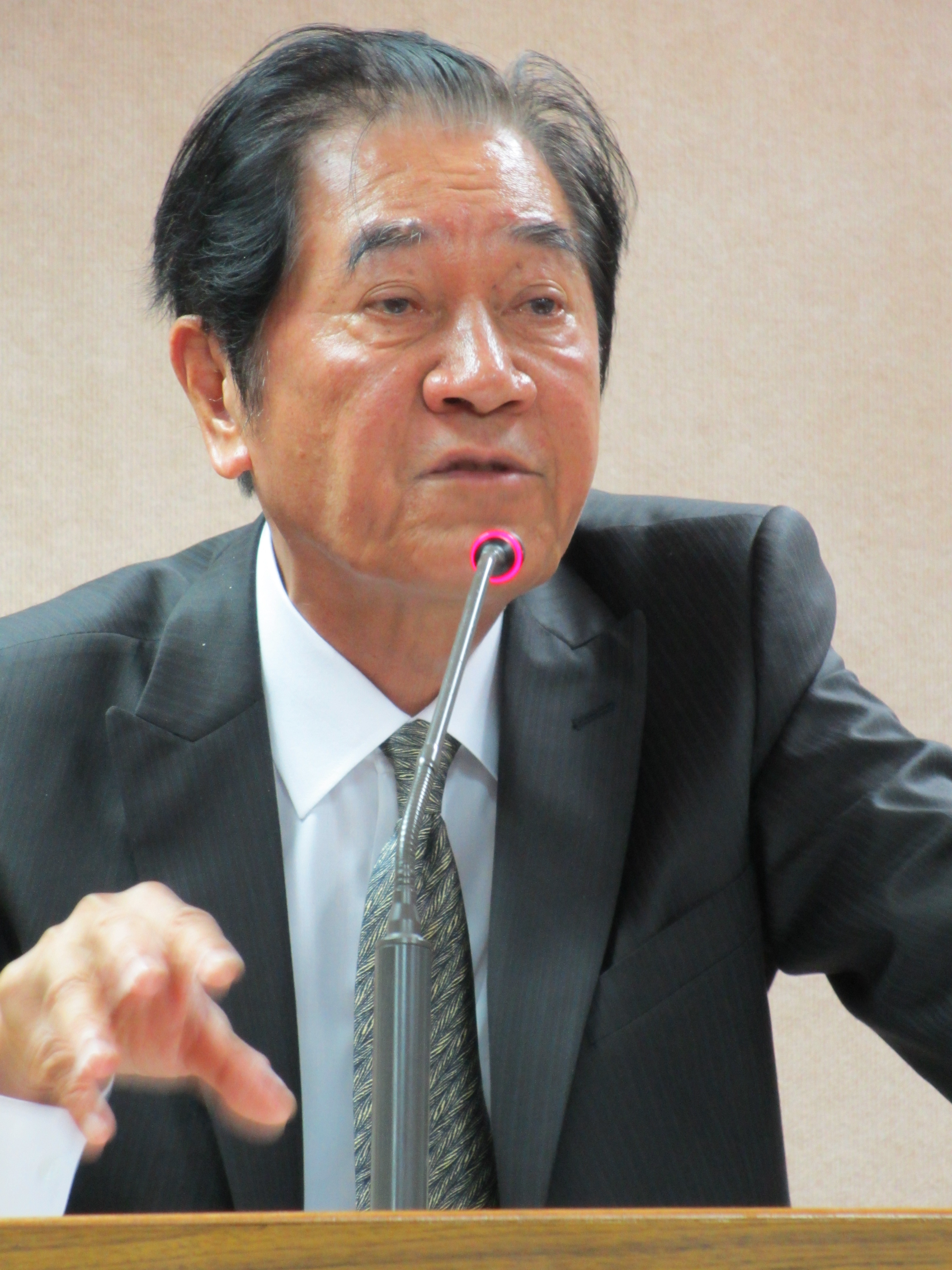 Chen Tangshan